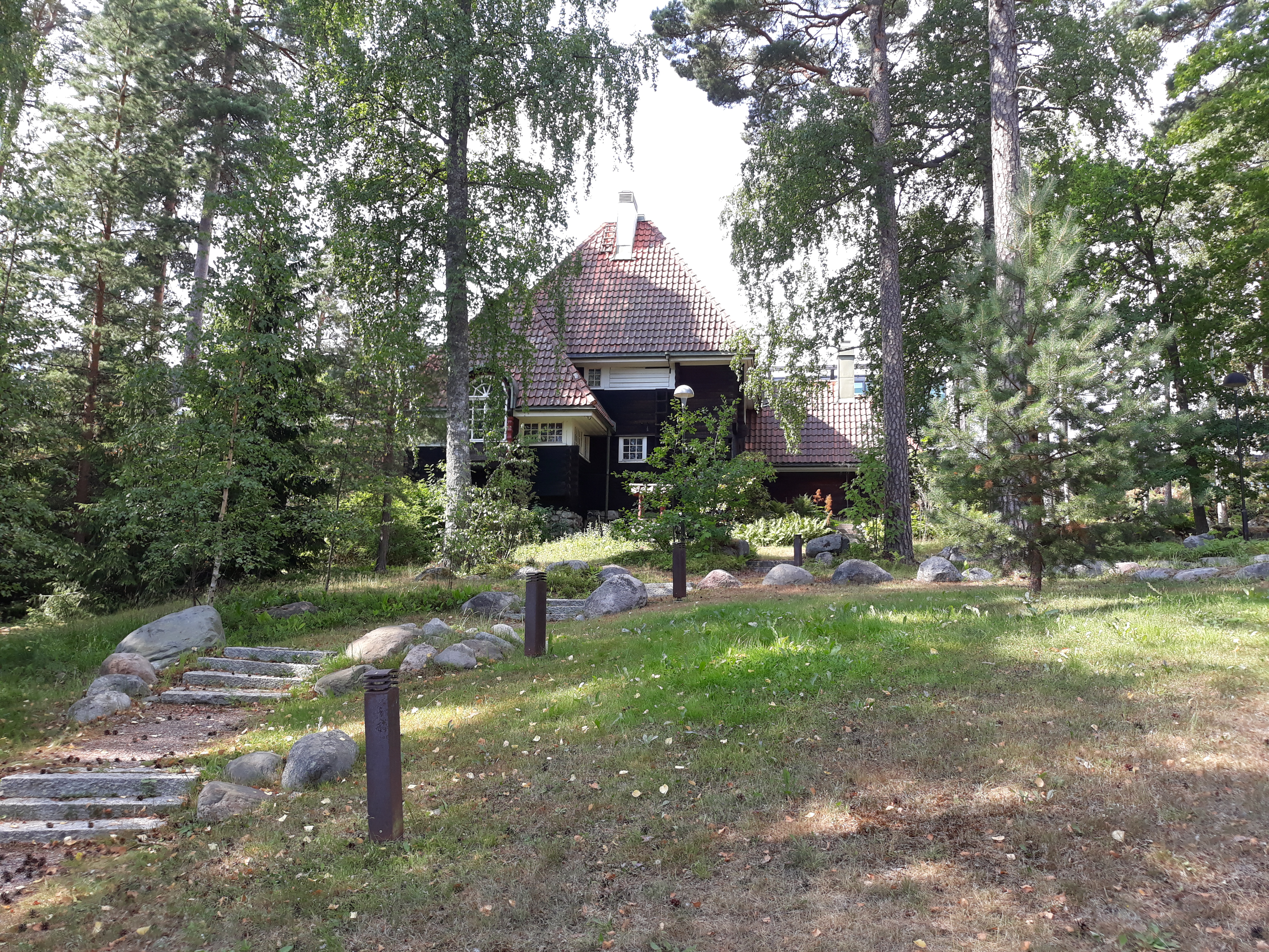 Villa Harbo Helsingin Vuosaaressa.